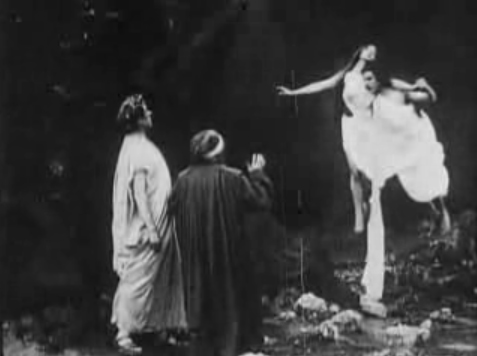 Inferno,_milano_films,_1911,_paolo_e_francesca